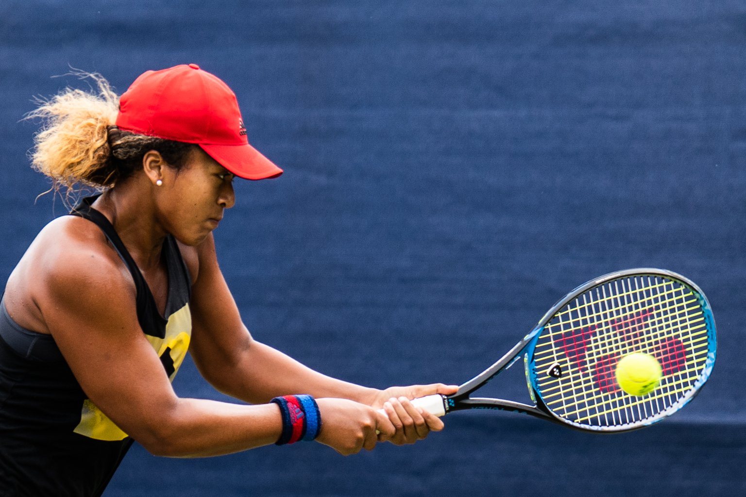 Naomi Osaka